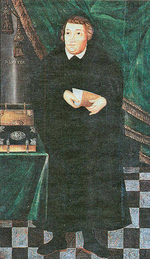 Martin Luther, av Didrik Möllerum. I Kvevlax kyrka.